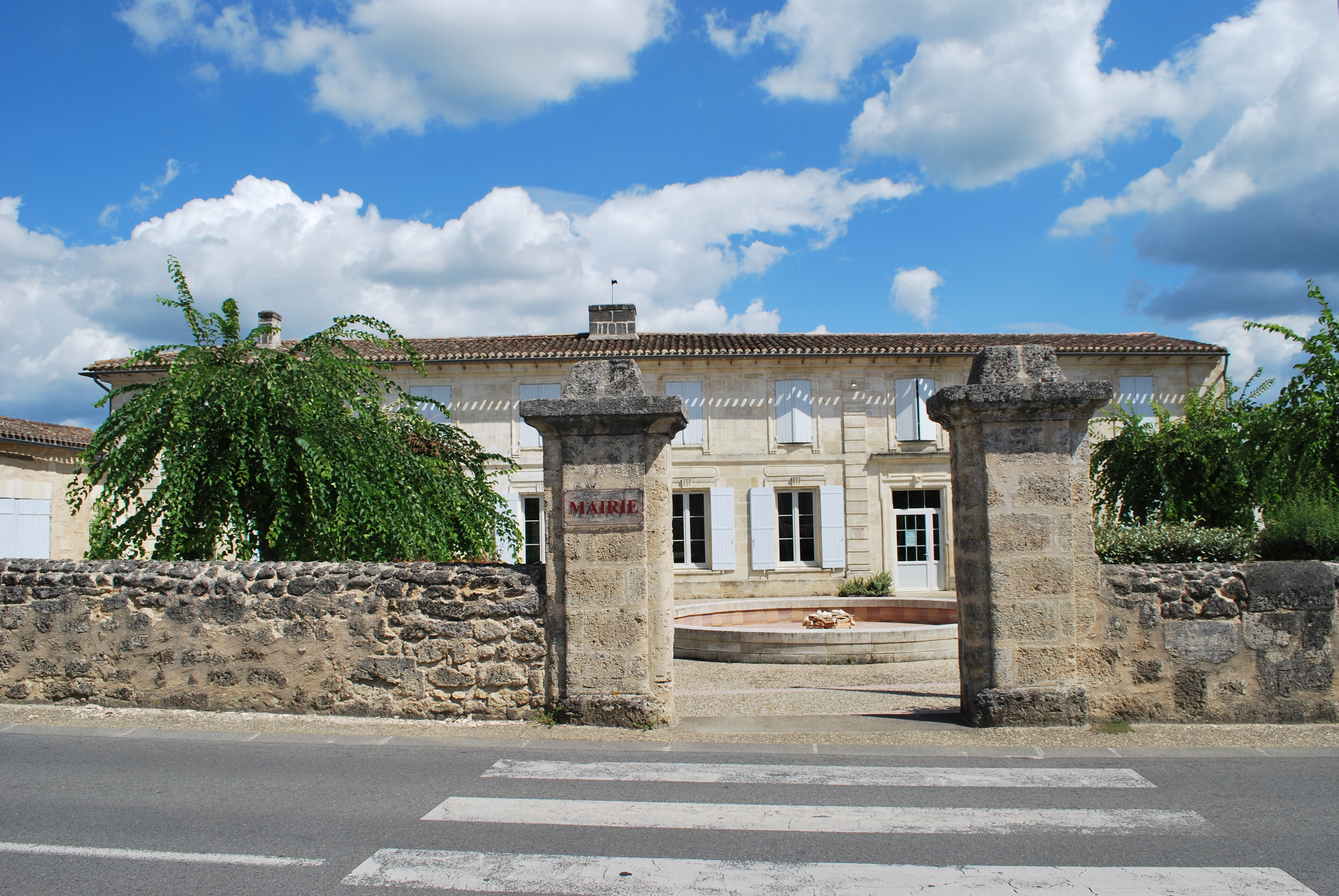 Aubie-et-Espessas